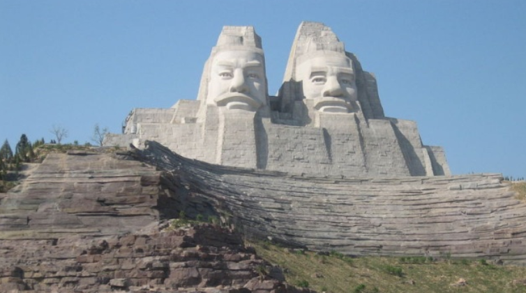 中文（中国大陆）: yanhuangdi